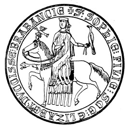 Secret Siegel von Sophie von Thuringia